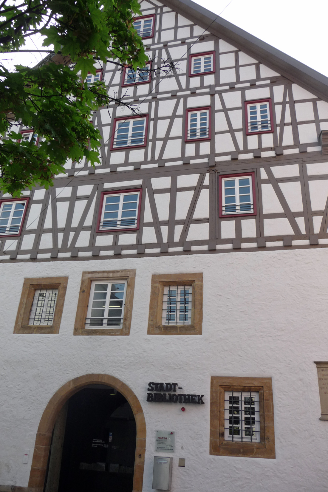 Adelberger Kornhaus Frontansicht